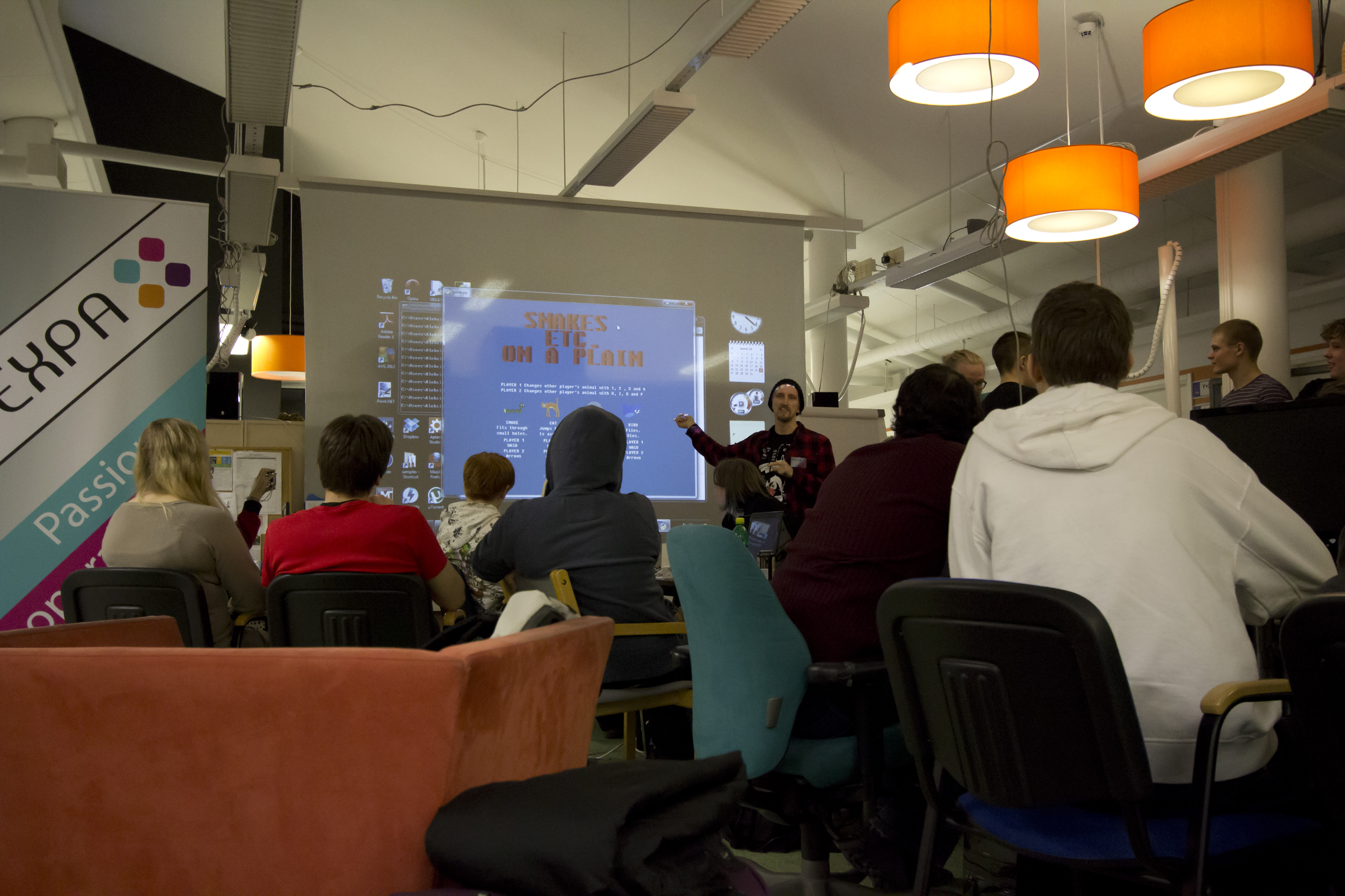 Global Game Jam 2014 Jyväskylä, Finland